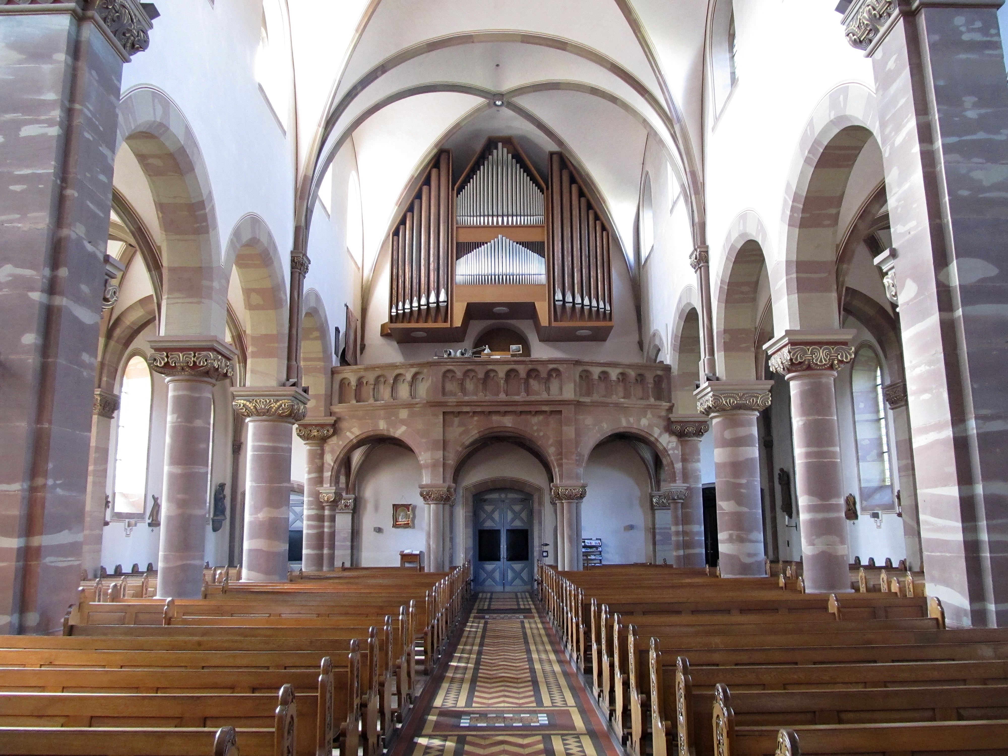 Blick ins Innere der katholischen Pfarrkirche St. Agatha in Kleinblittersdorf, Regionalverband Saarbrücken, Saarland